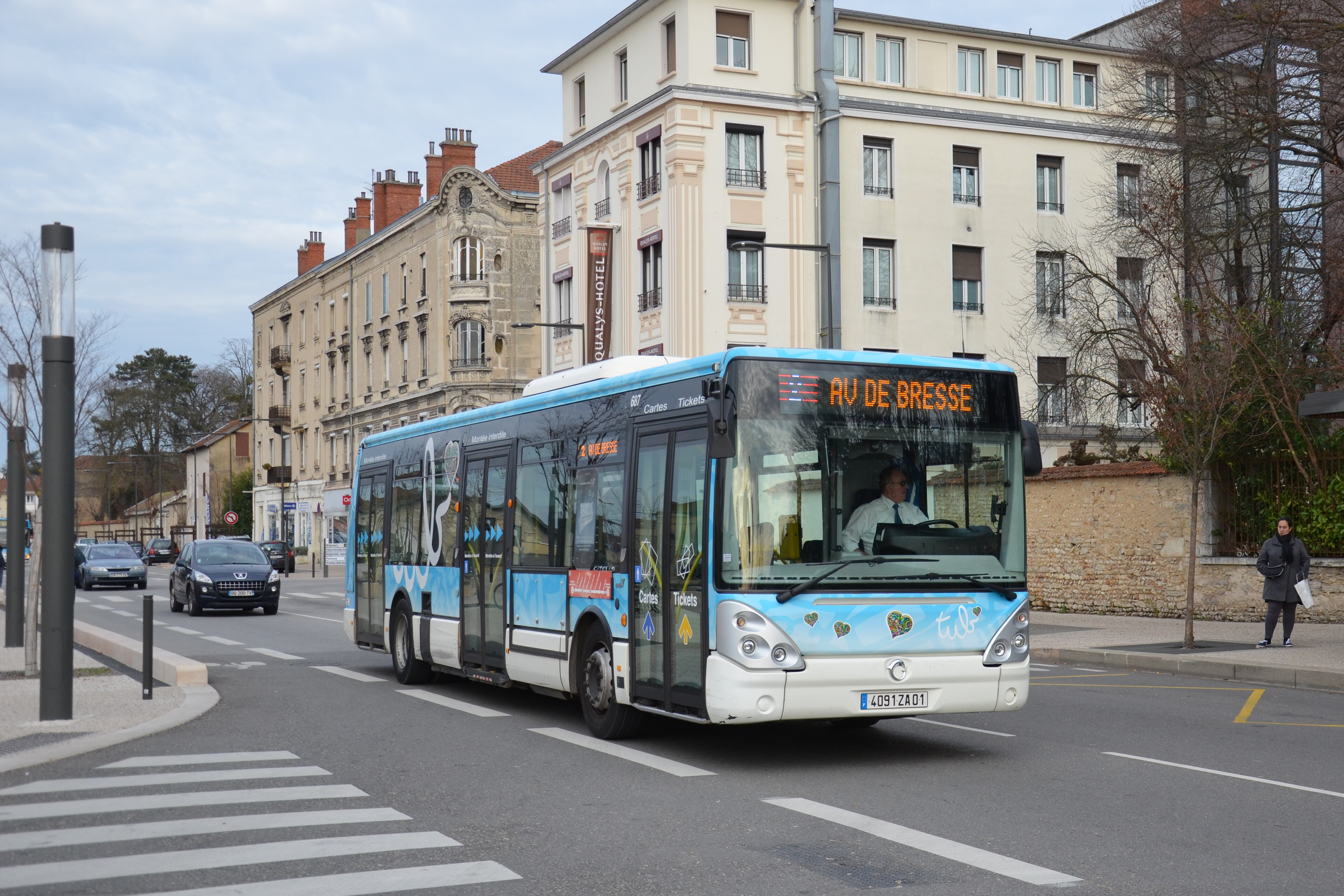 Irisbus Citelis 12 n°687 du réseau TUB de Bourg-en-Bresse, près de l'arrêt Sémard Gare.